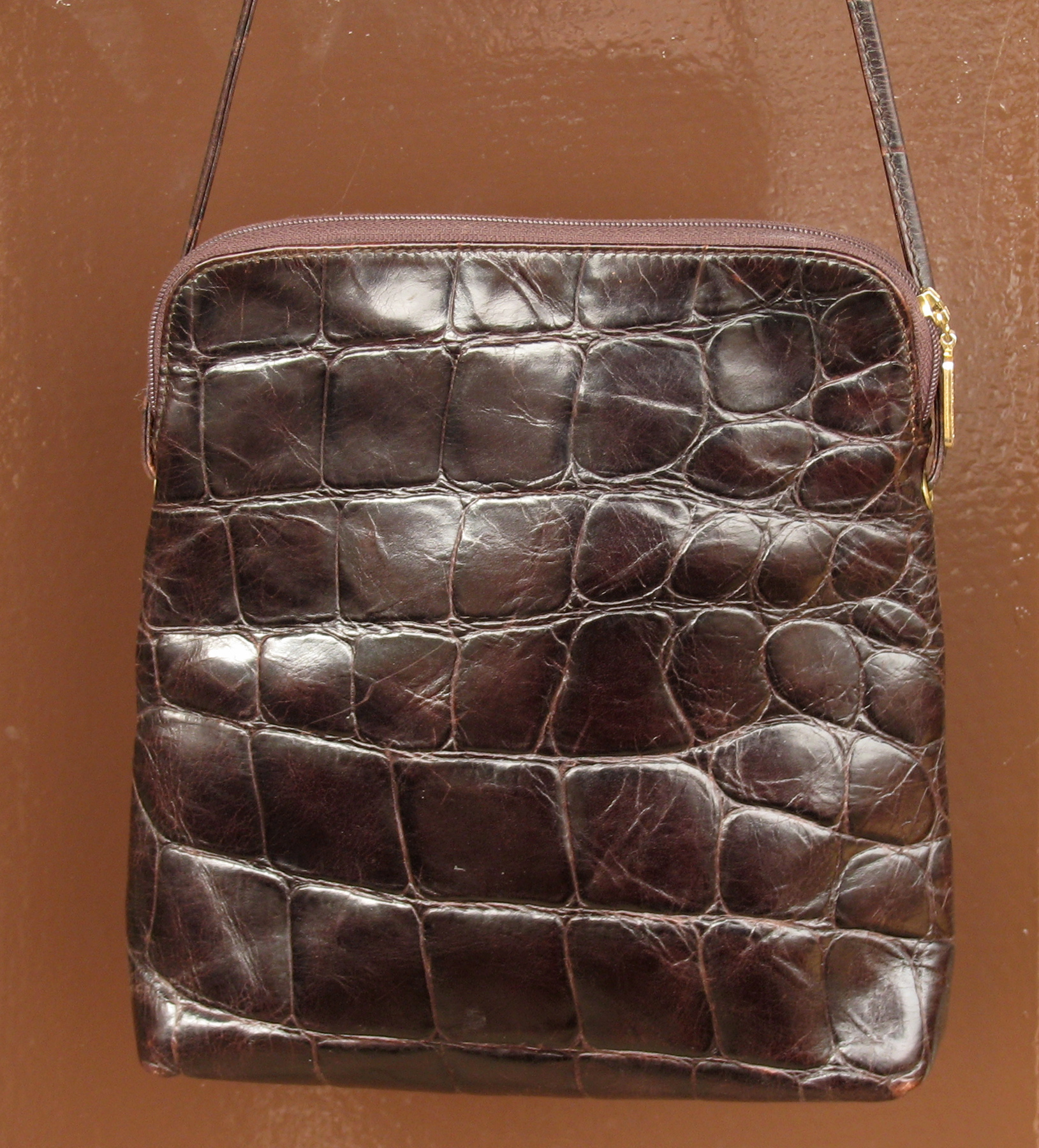 Handtasche mit Krokoprägung